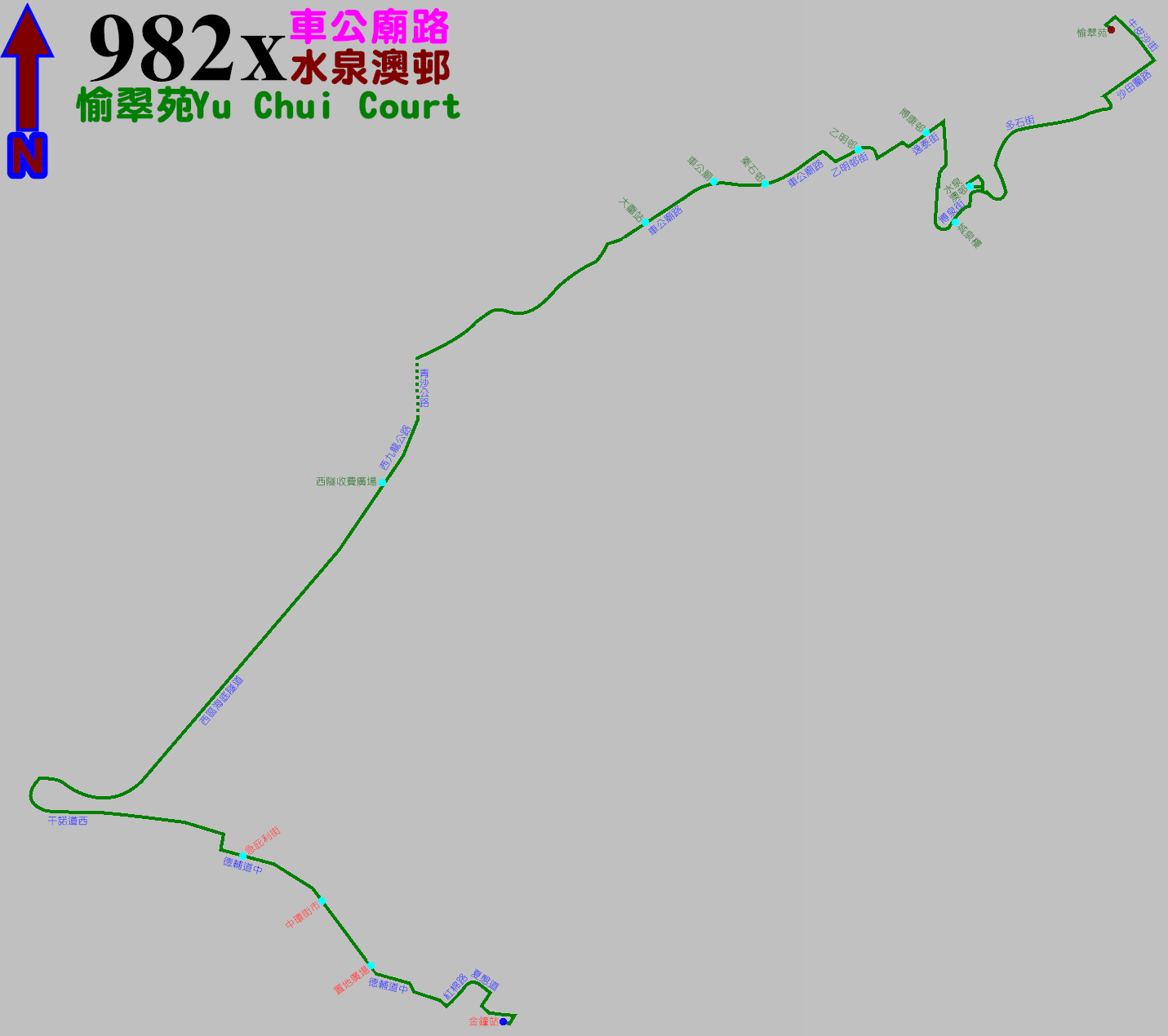 過海隧巴982X線沙田方向的走線圖